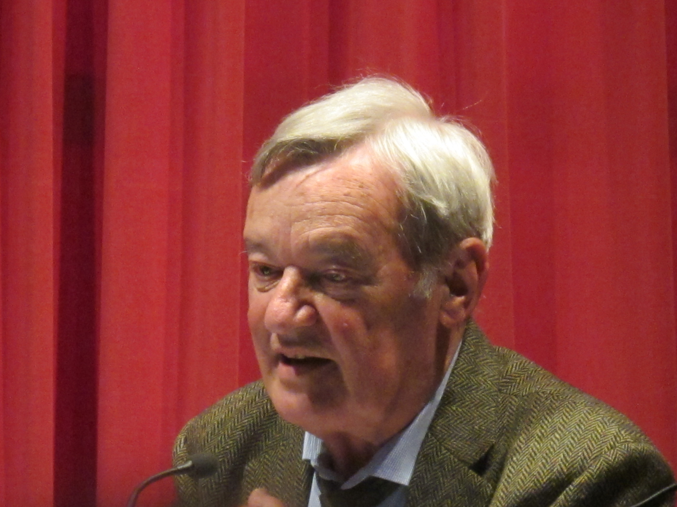 Das Lyrische Quartett im Lyrik Kabinett, Harald Hartung